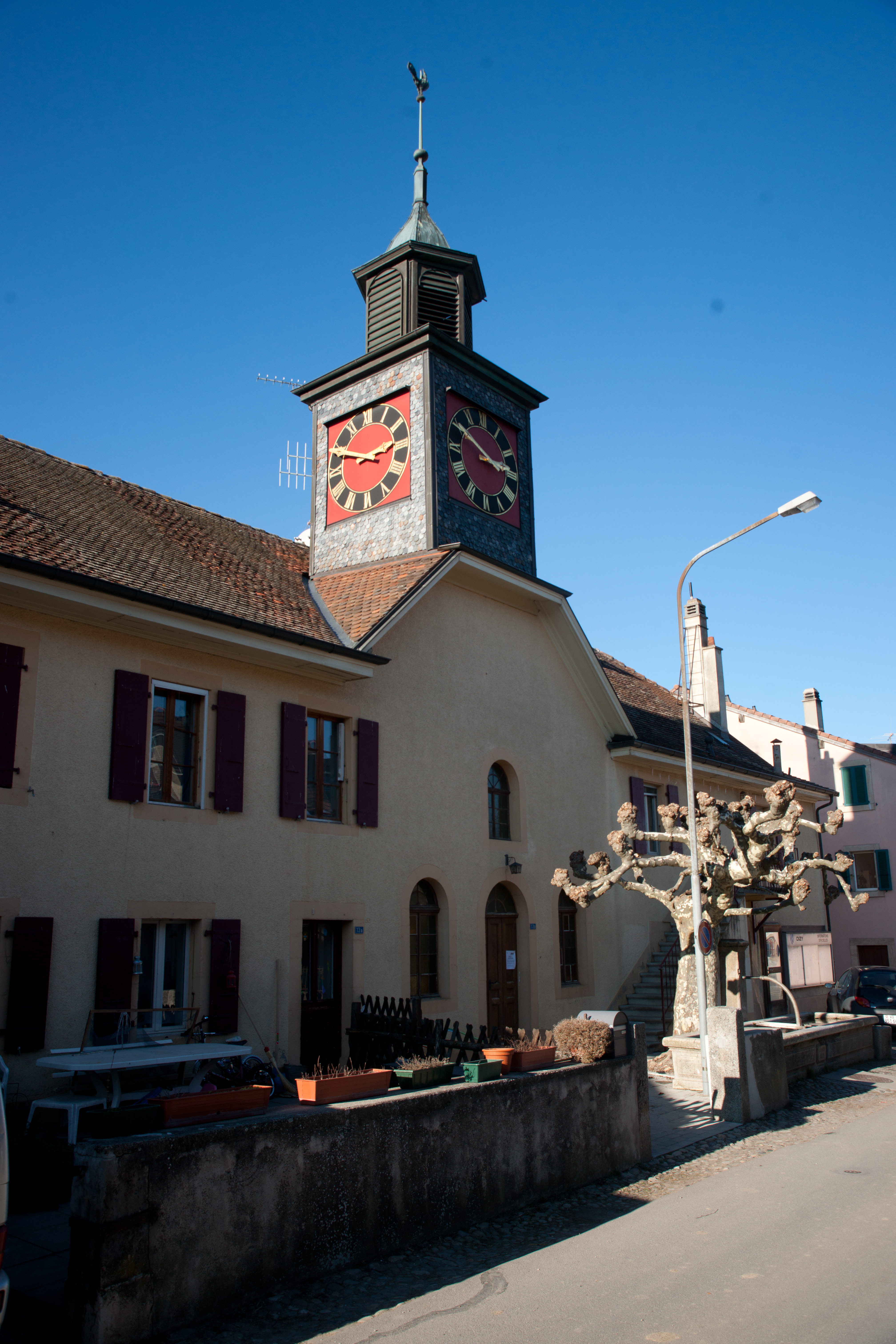 Dizy, canton de Vaud, Suisse.